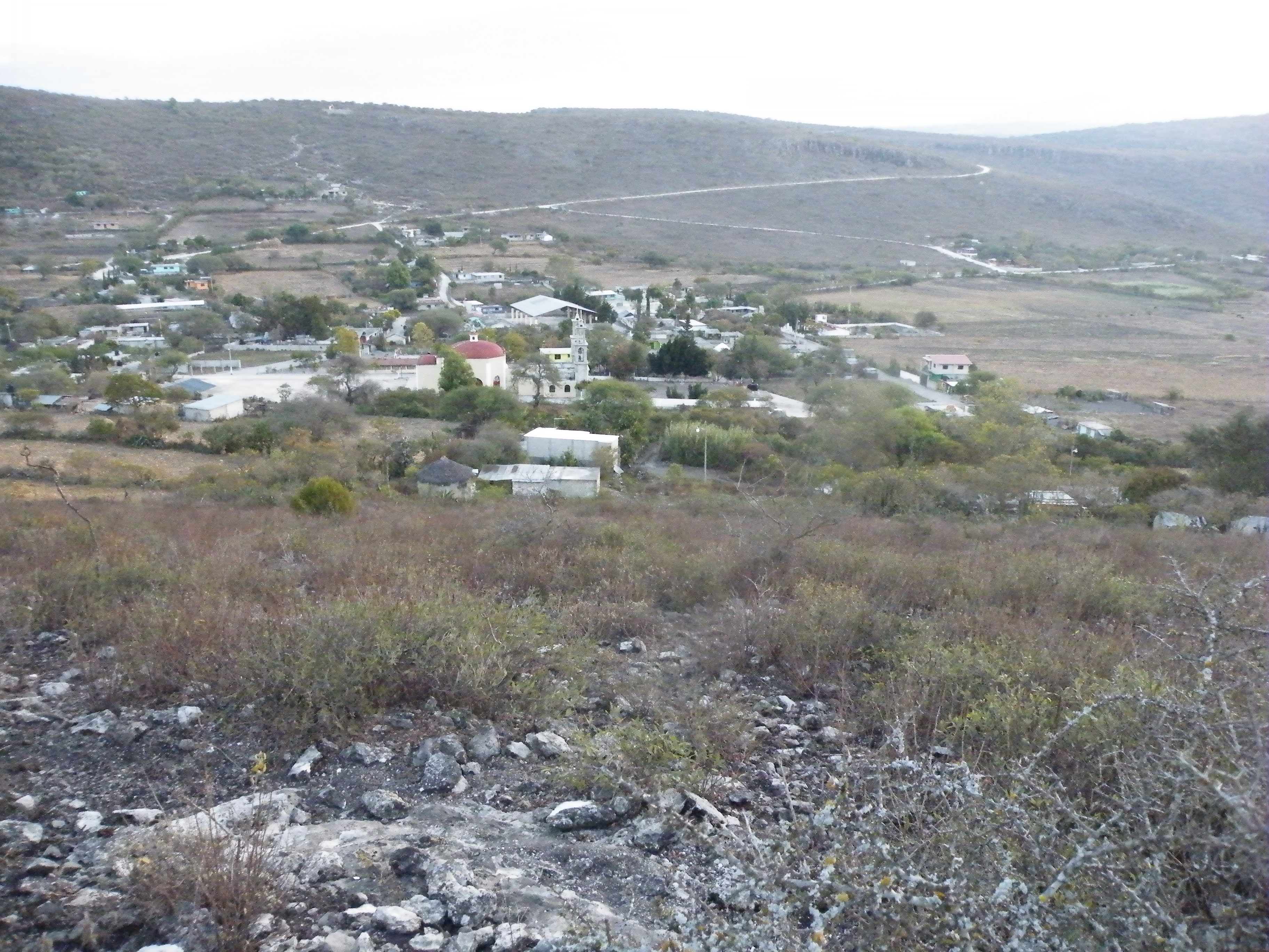 Gilo, Hidalgo